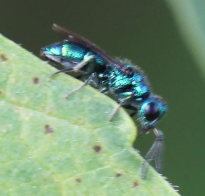 Vermutlich die Blaue Goldwespe (Trichrysis cyanea), am 4. September 2018 in der Schwetzinger Hardt